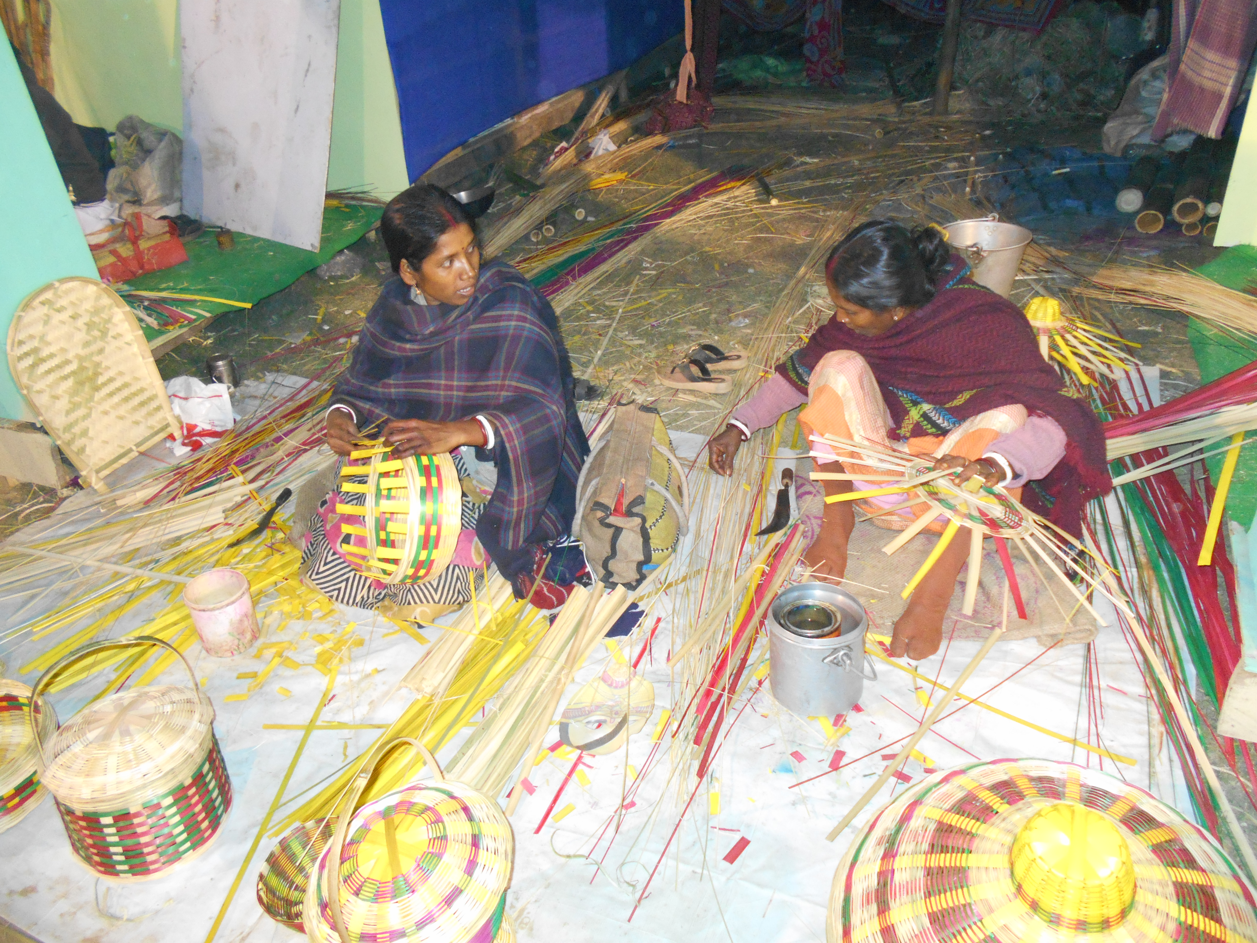 বাঁশের ঝুড়ি তৈরি হচ্ছে